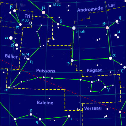 Carte pour la constellation des Poissons Produite à l'aide du logiciel PP3